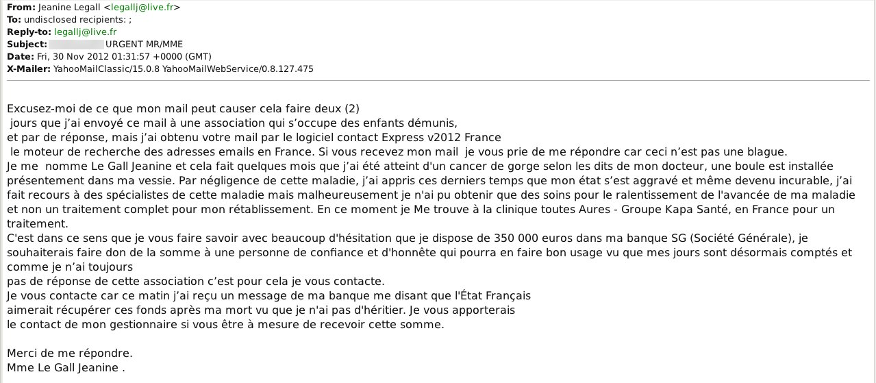 Exemple de mail frauduleux (dite arnaque 4.1.9).